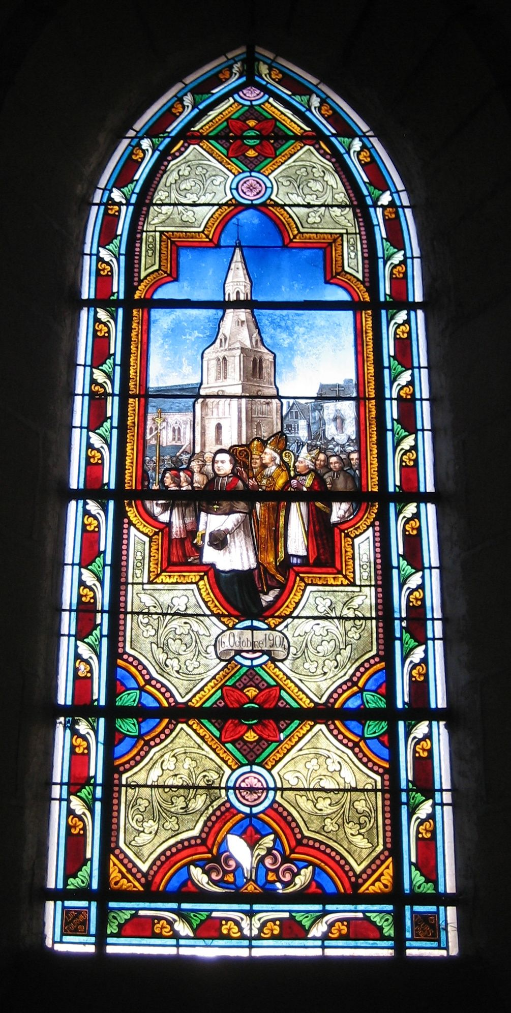 Église Saint-Germain de La Châtre Vitrail de la consécration, en 1904